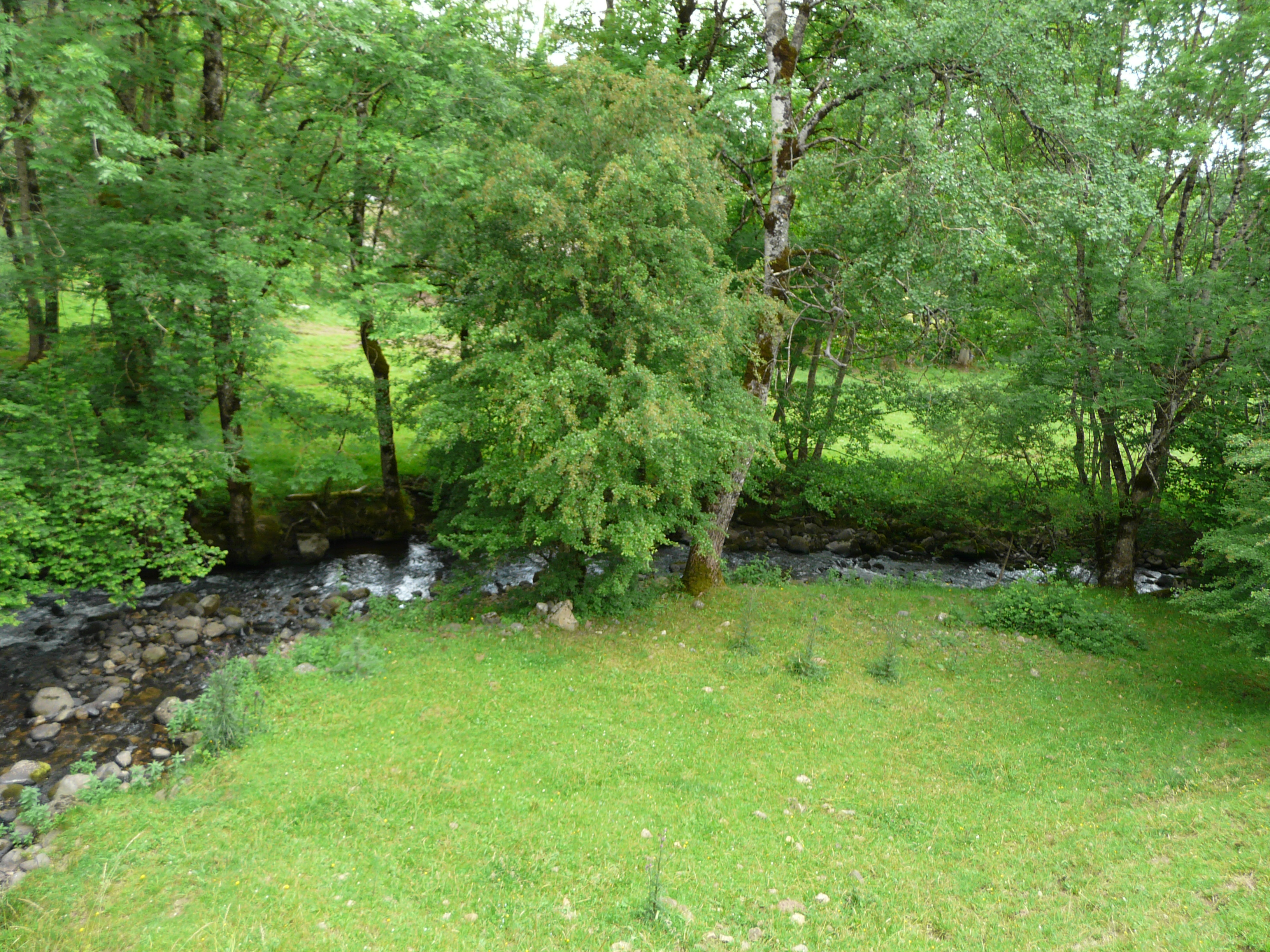 Le Bonjon en aval du pont de la route départementale 36, Marcenat, Cantal, France.